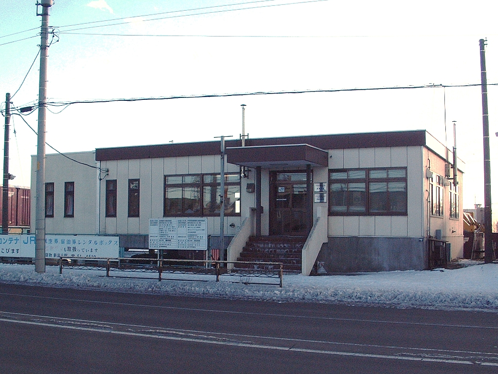 JR貨物新富士駅駅舎